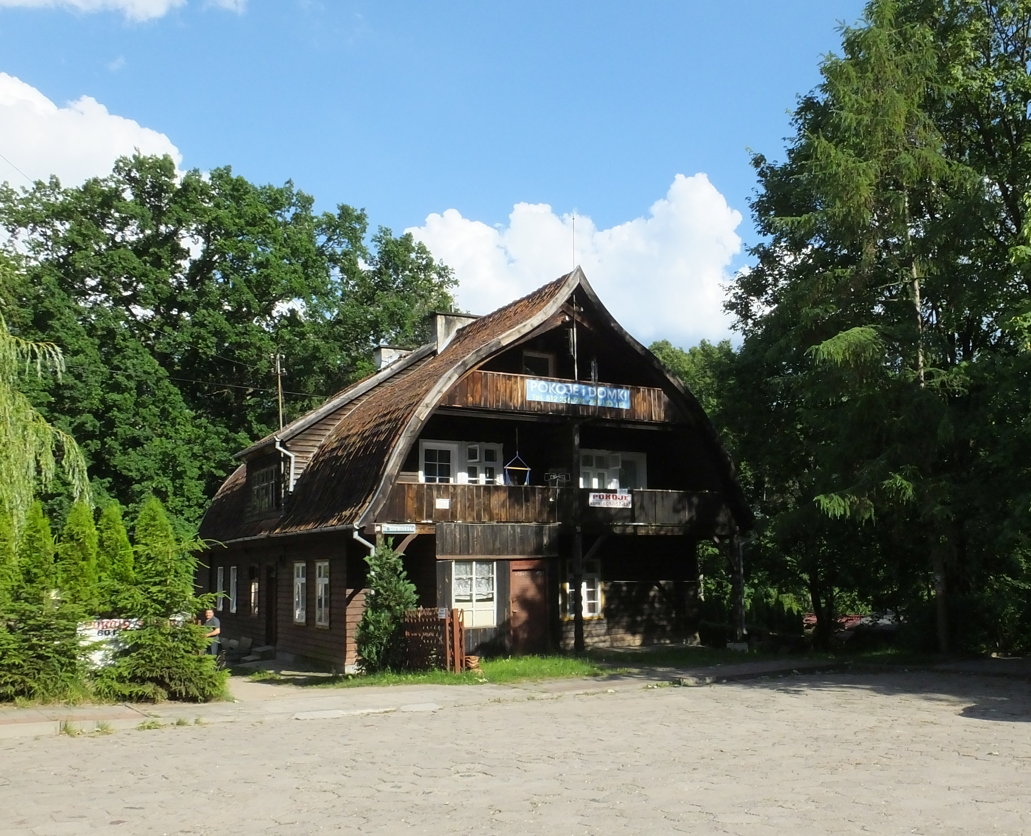 Willa w Rucianem-Nizie przy ul. Słowiańskiej 19, Borejszówka